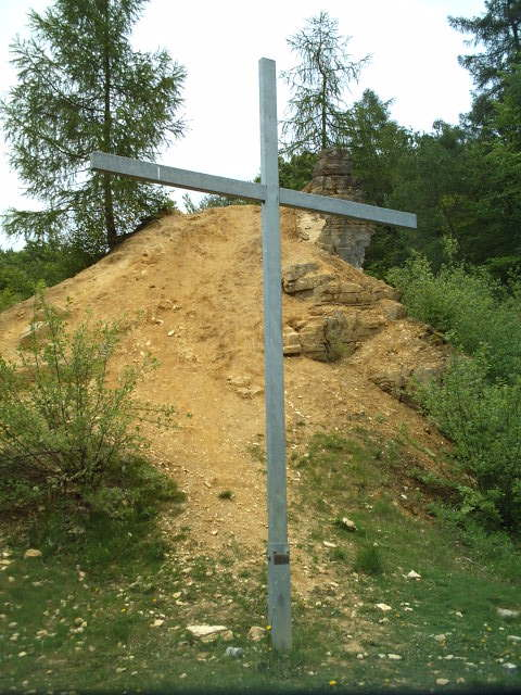 Steinbruch in hollage mit Stifter-Kreuz